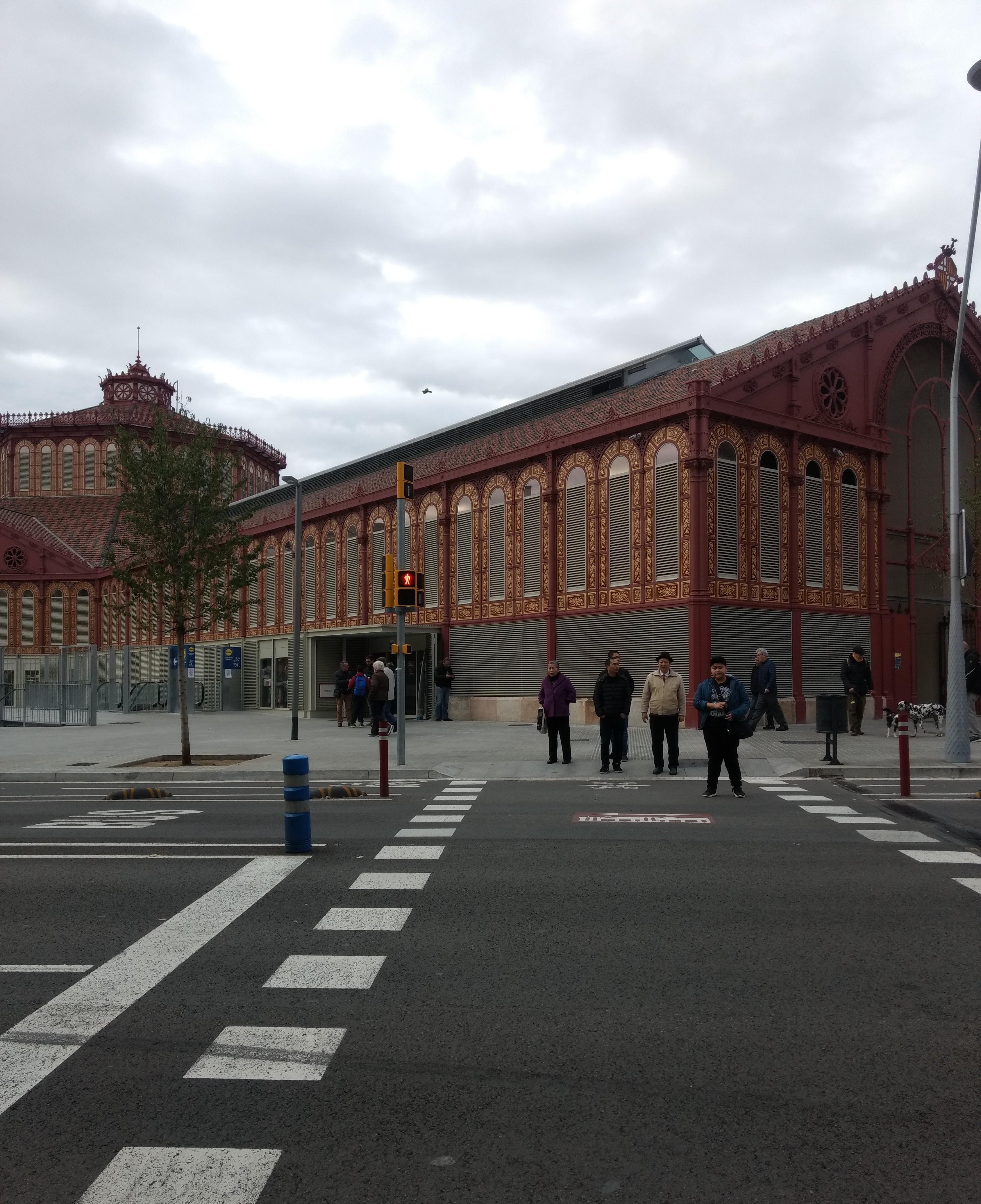 Mercat de Sant Antoni per fora. Fachadas y plaza pública